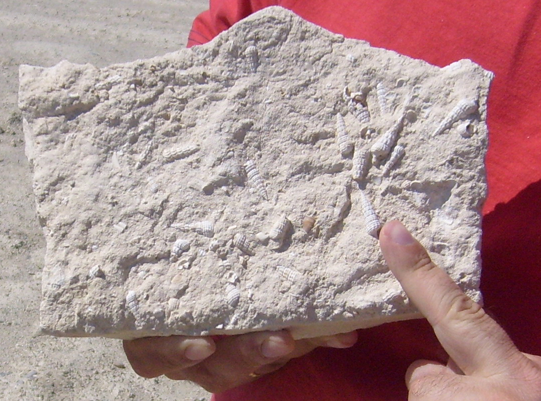 Sopronkőhidai homok Turritella turris házmaradványokkal